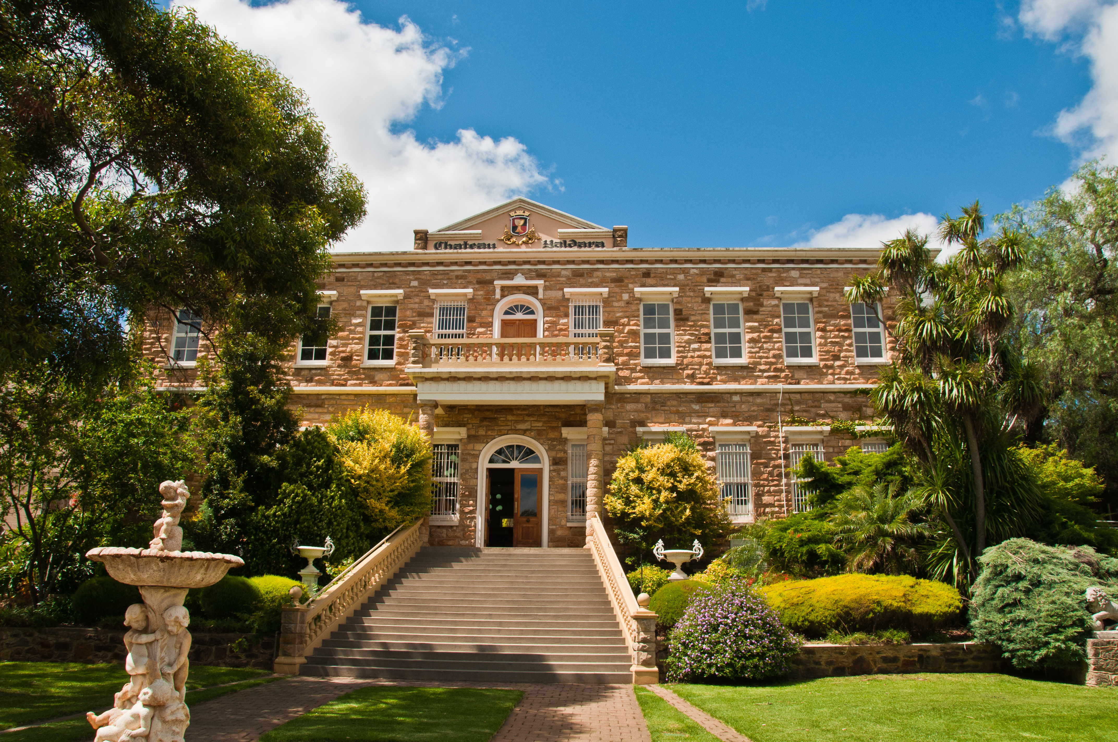 Chateau Yaldara